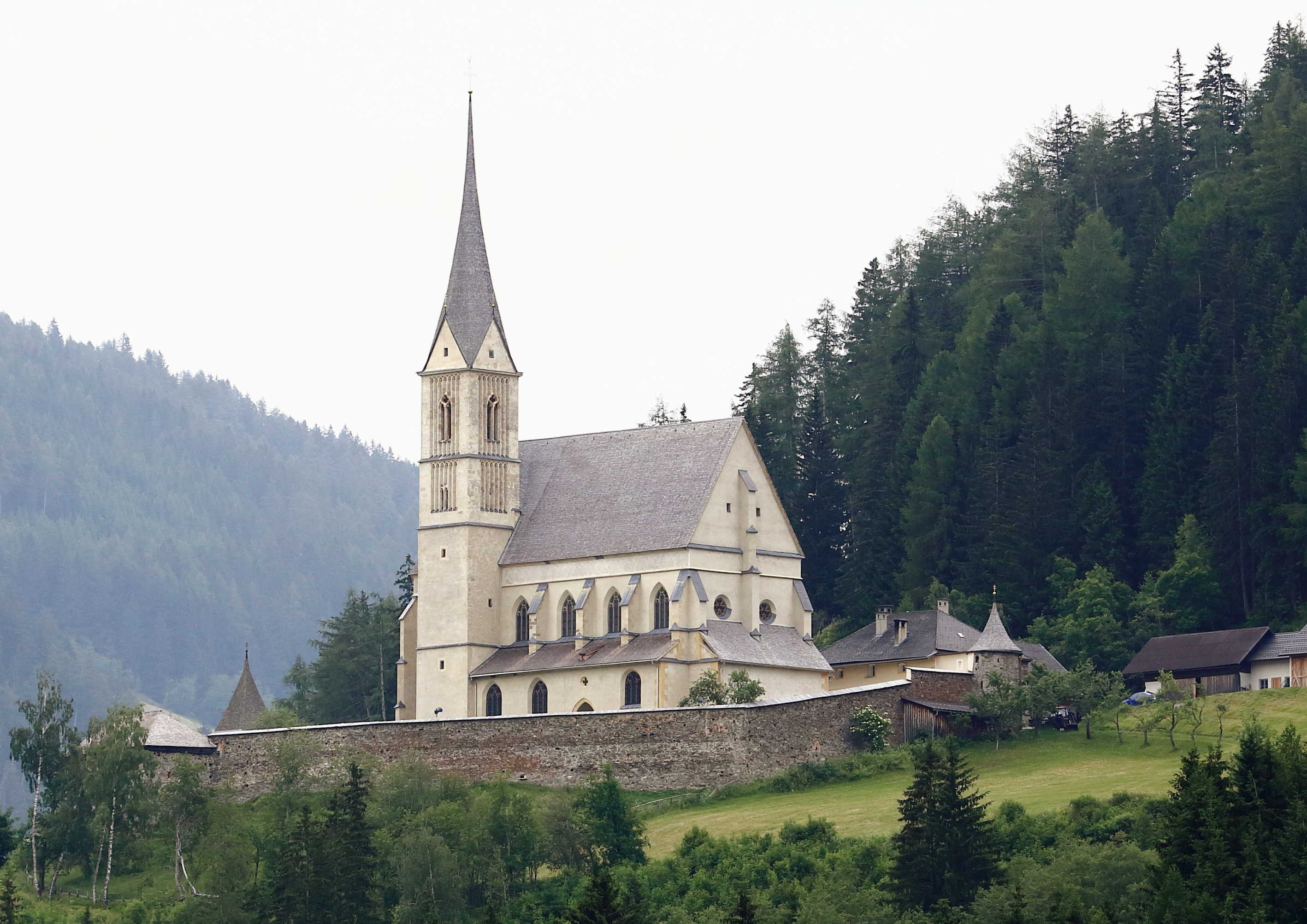 Die Wallfahrtskirche hl.Leonhard in der Salzburger Stadt Tamsweg.